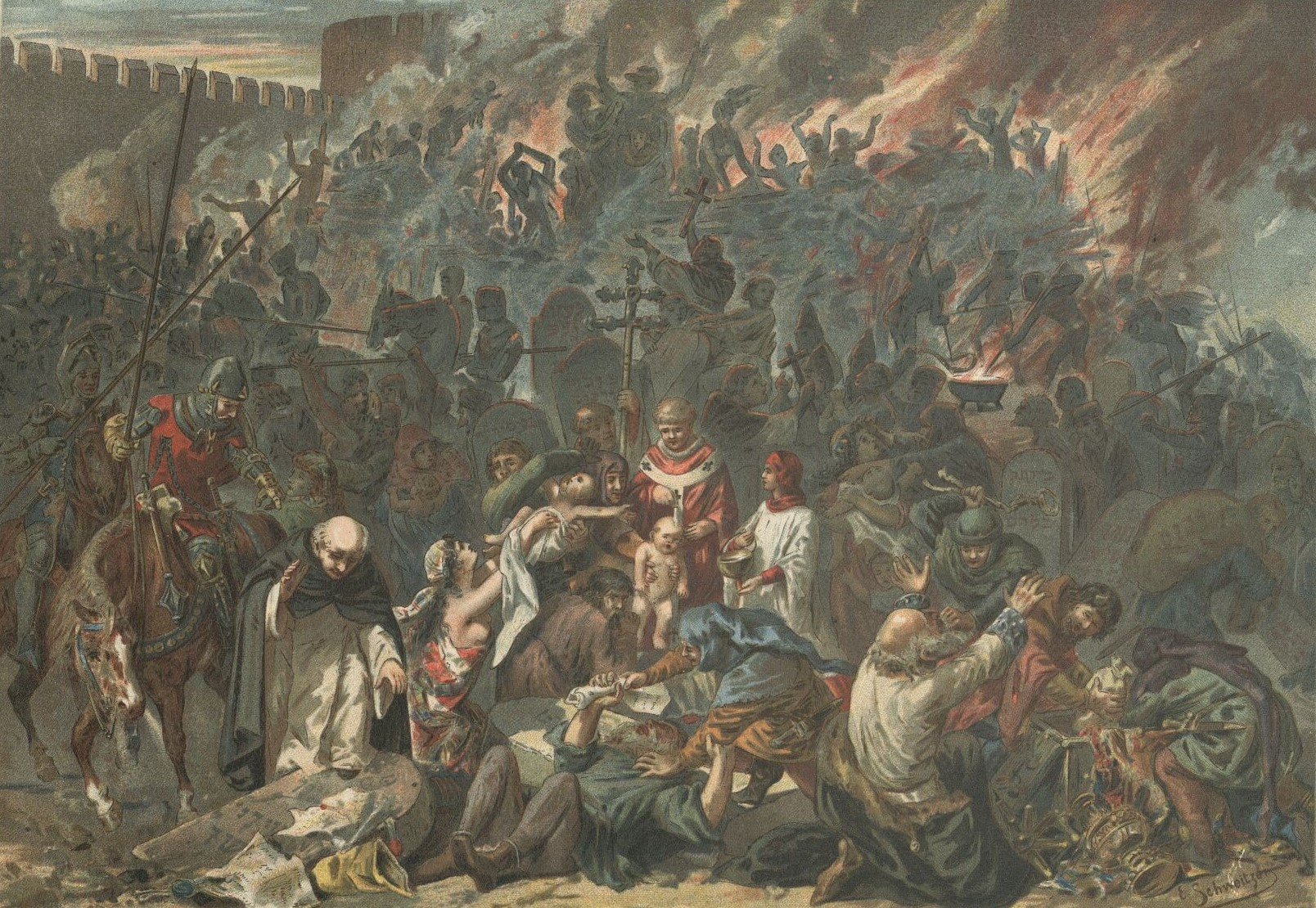 Illustration de 1894 représentant le pogrom de Strasbourg (massacre des habitants juifs de la ville) le 14 février 1349